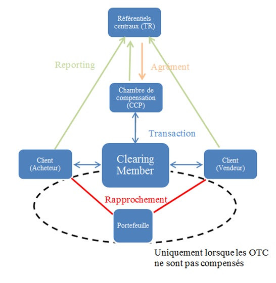 Schéma cible